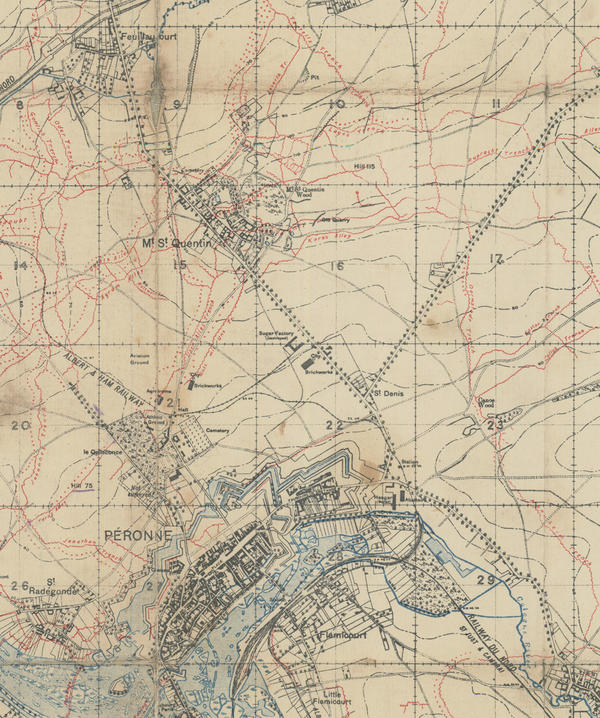 Extrait du canevas de tir britannique "France Sheet 62C N.W" du 8 janvier 1917-échelle 1/20000ème En rouge, les positions alliées; en bleu, les positions allemandes.